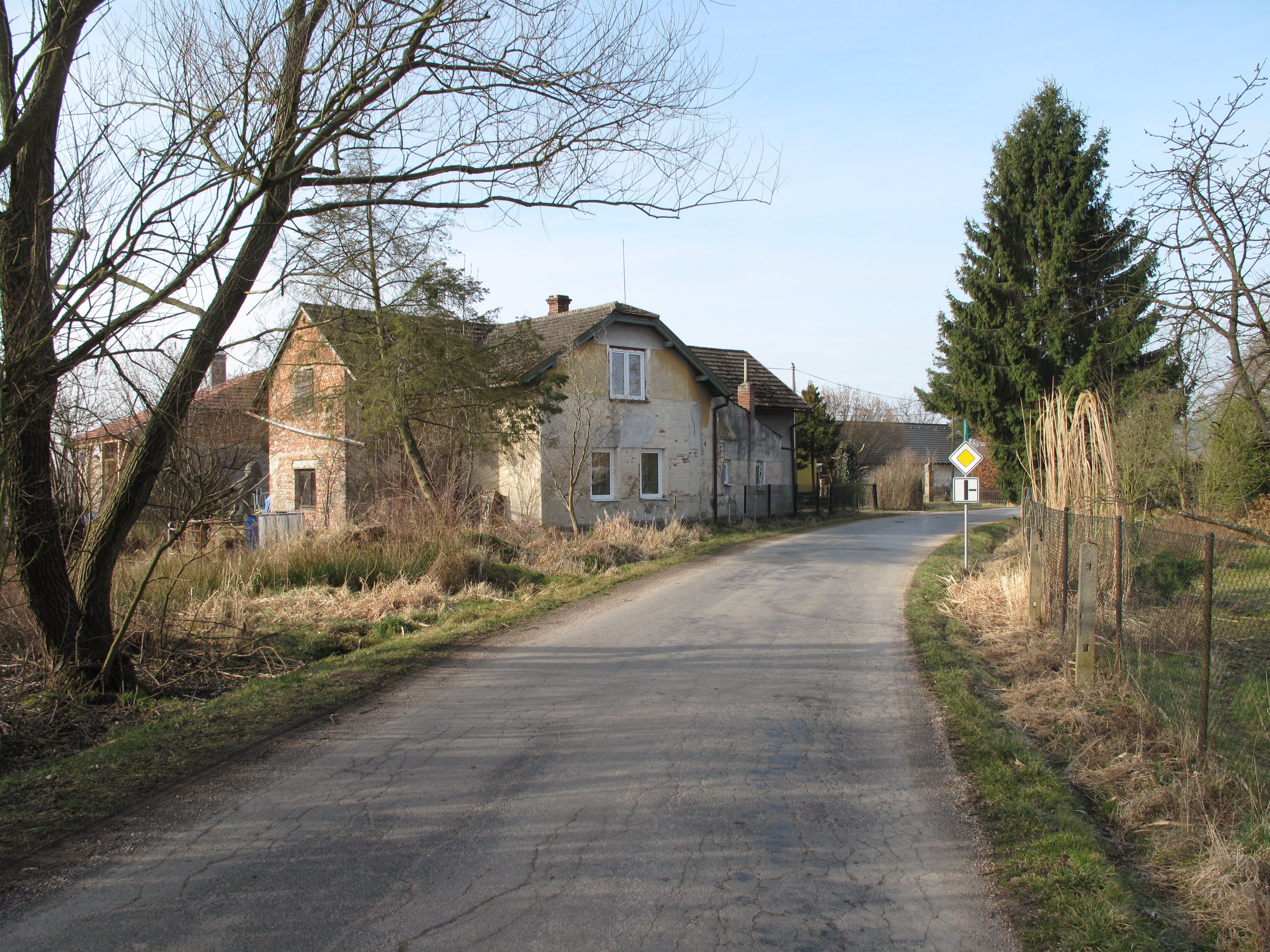 Silnice v Hradci. Okres Mladá Boleslav, Česká republika.